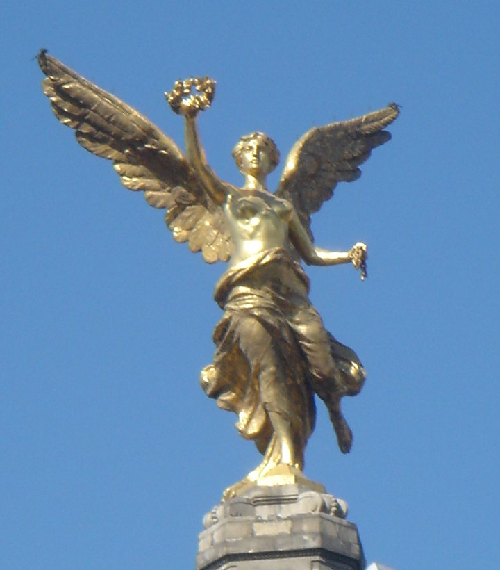 Ángel de la Independencia, Mexico City